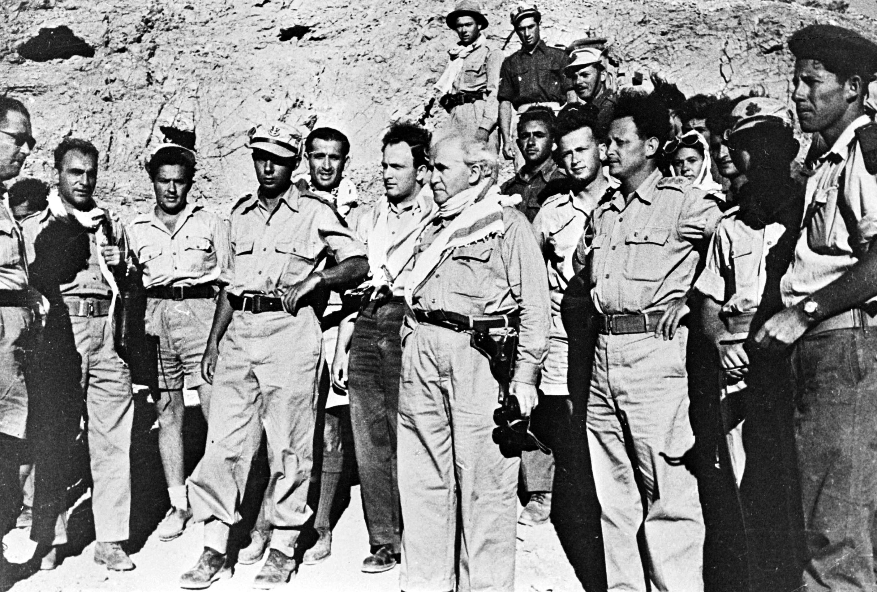 YITZHAK RABIN AS YOUNG PALMACH COMMANDER ON TOUR OF NEGEV WITH DAVID BEN GURION AND YIGAL ALLON. יצחק רבין כמפקד צעיר בפלמח בסיור בנגב עם דוד בן גוריון